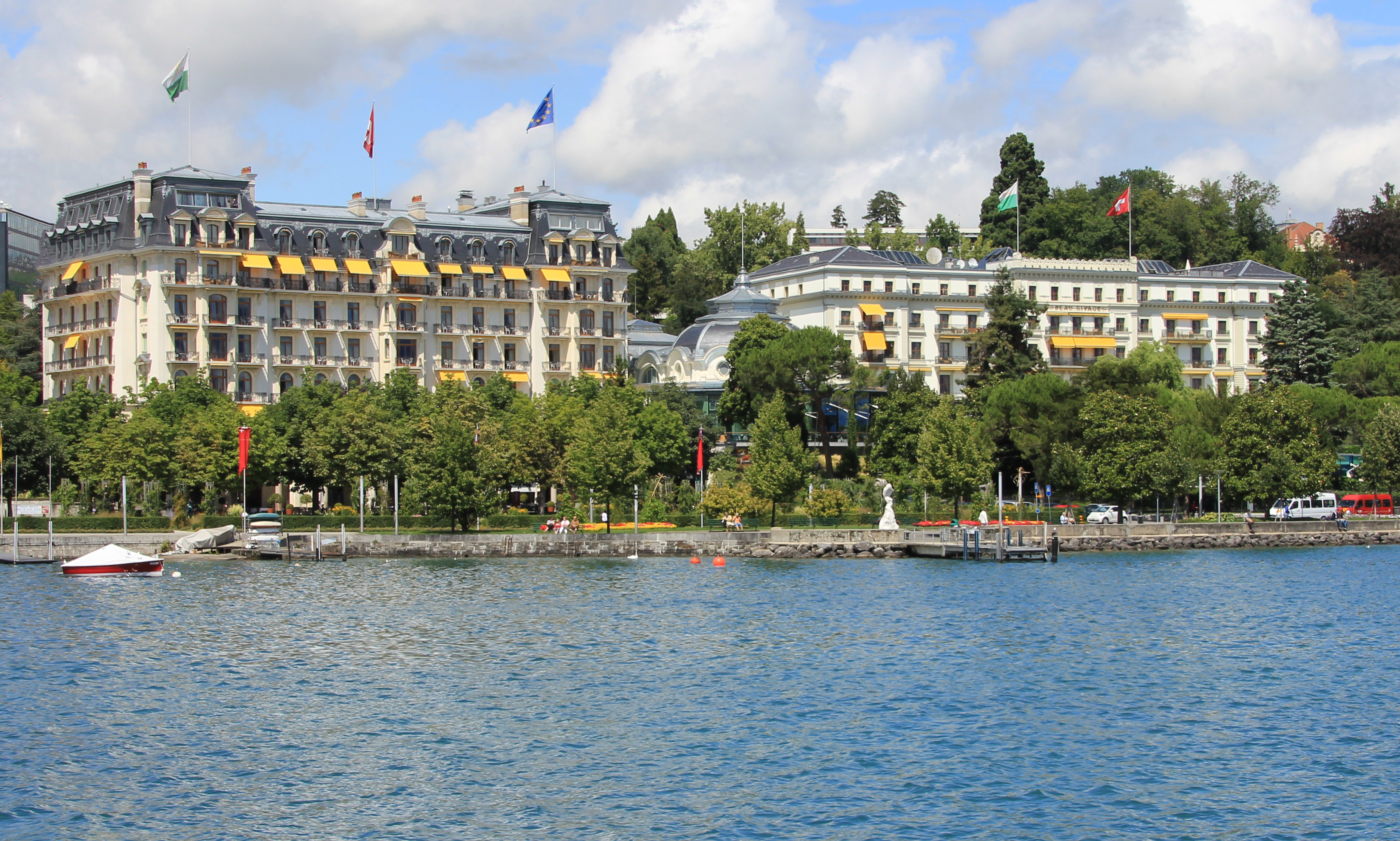 Hotel, Lausanne, Suisse